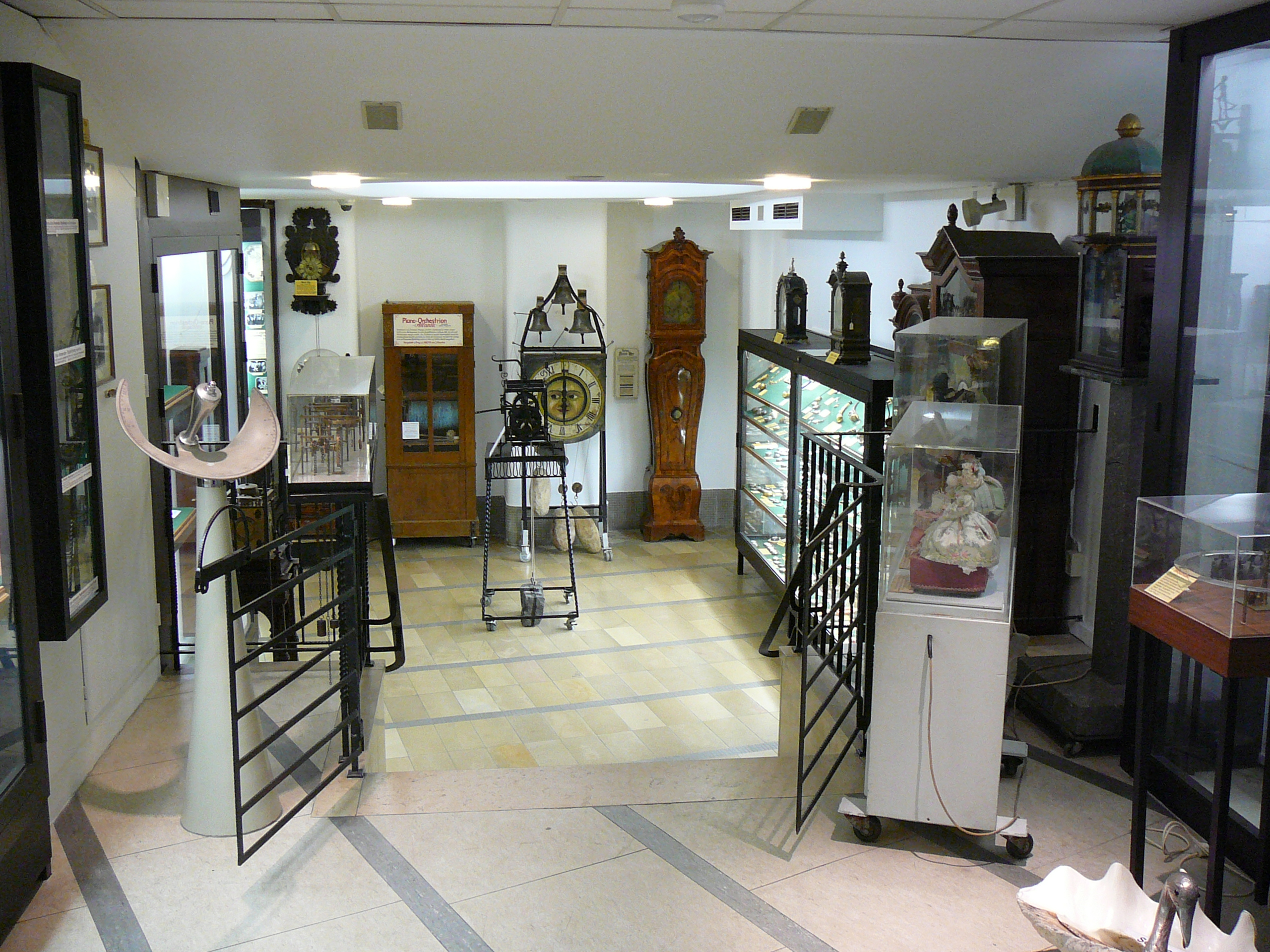 Wuppertaler Uhrenmuseum bei Juwelier Abeler in Wuppertal, Poststr. 11